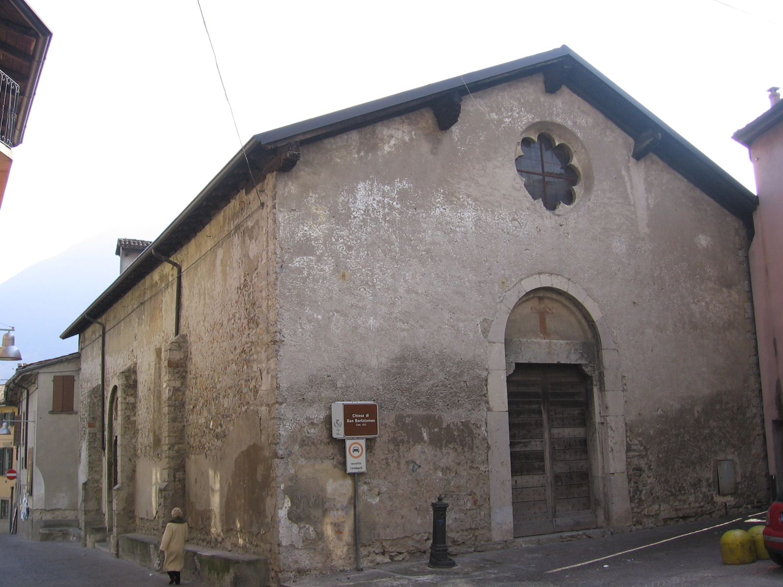 Albino, centro storico, Bergamo, Italy